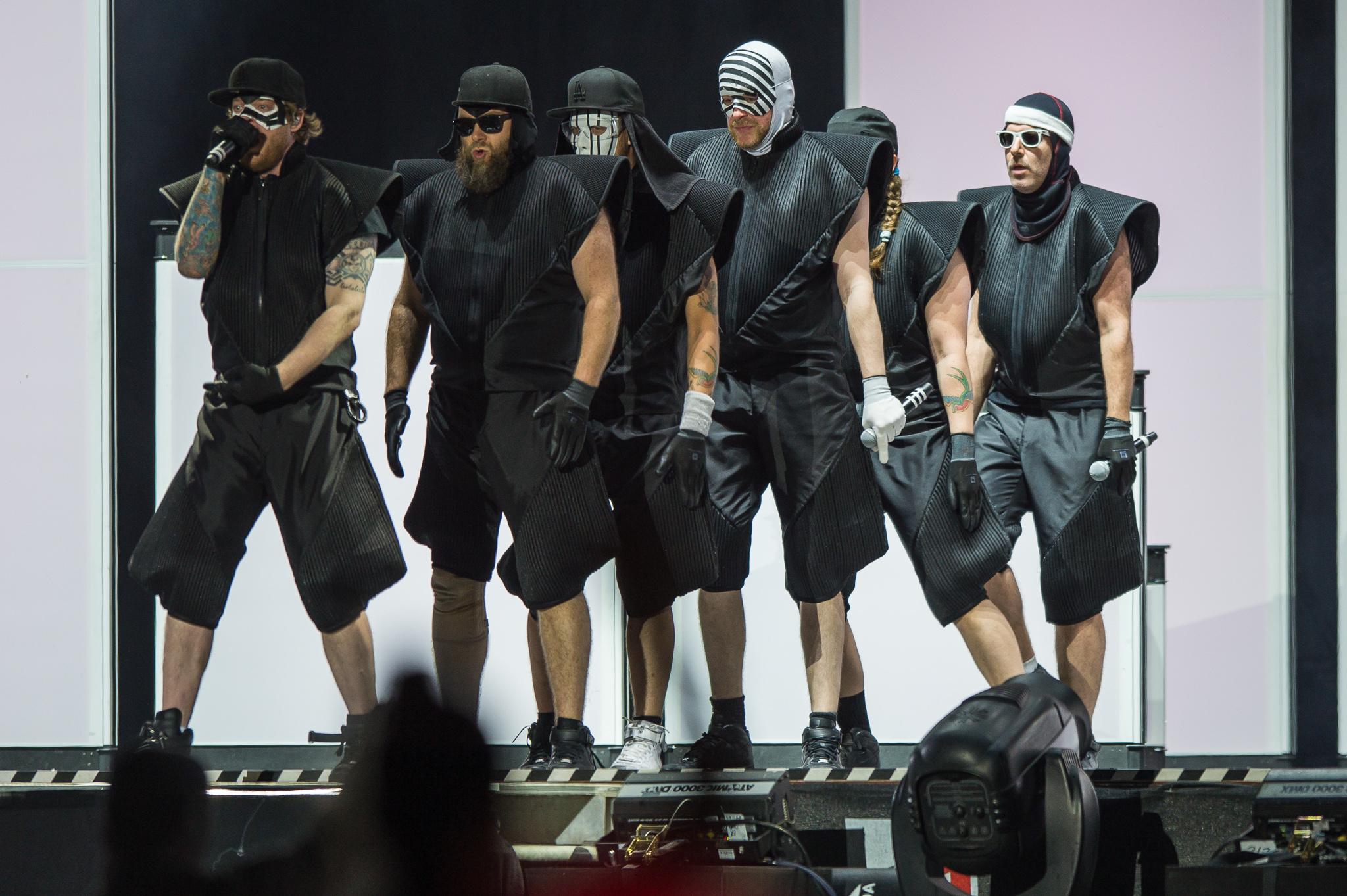 ARGO-Konzerte,Beck's Park Stage,Deichkind,Festival,Konzert,Livekonzert,Livemusik,Musik,RiP,Rock im Park 2015